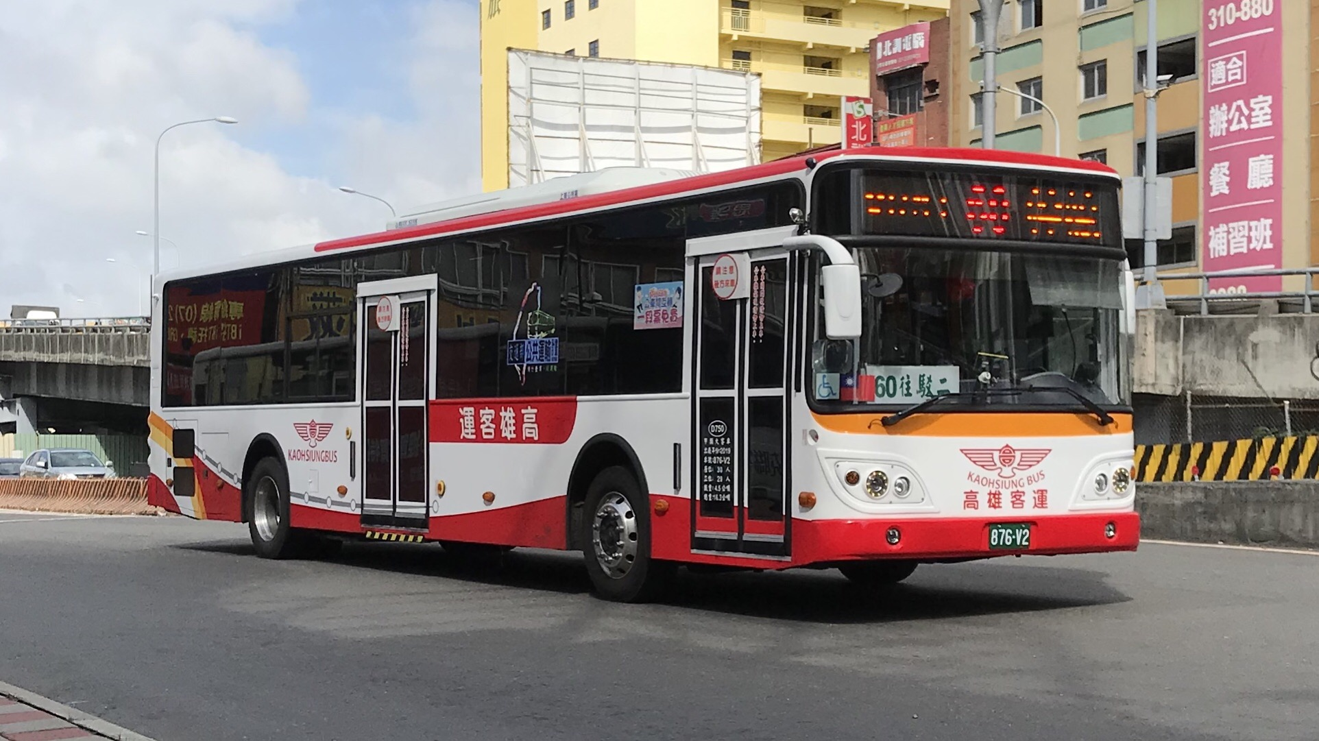 高雄客運台灣成運